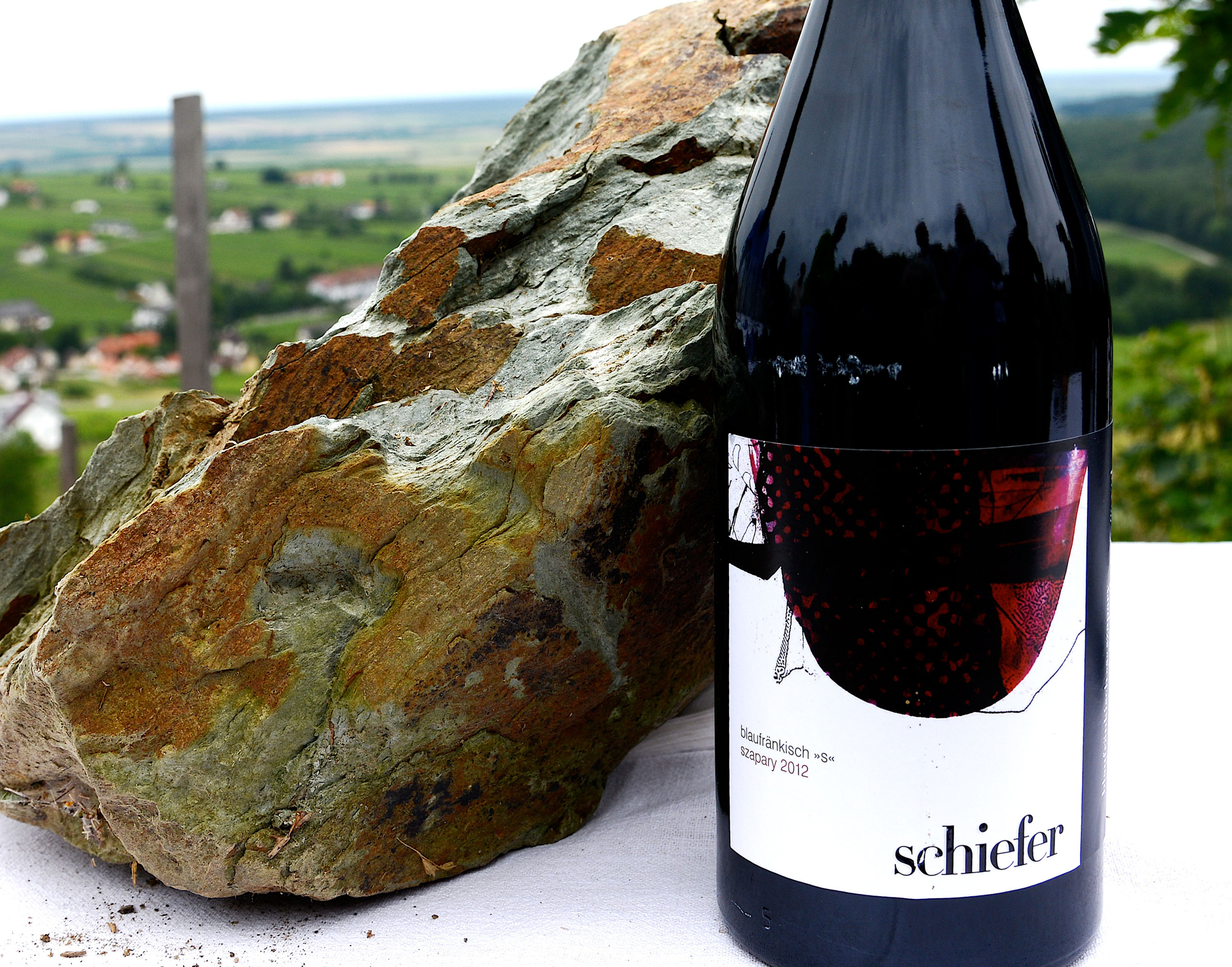 Etikett und Schiefergestein bei einer Präsentation am Eisenberg im Juni 2014.